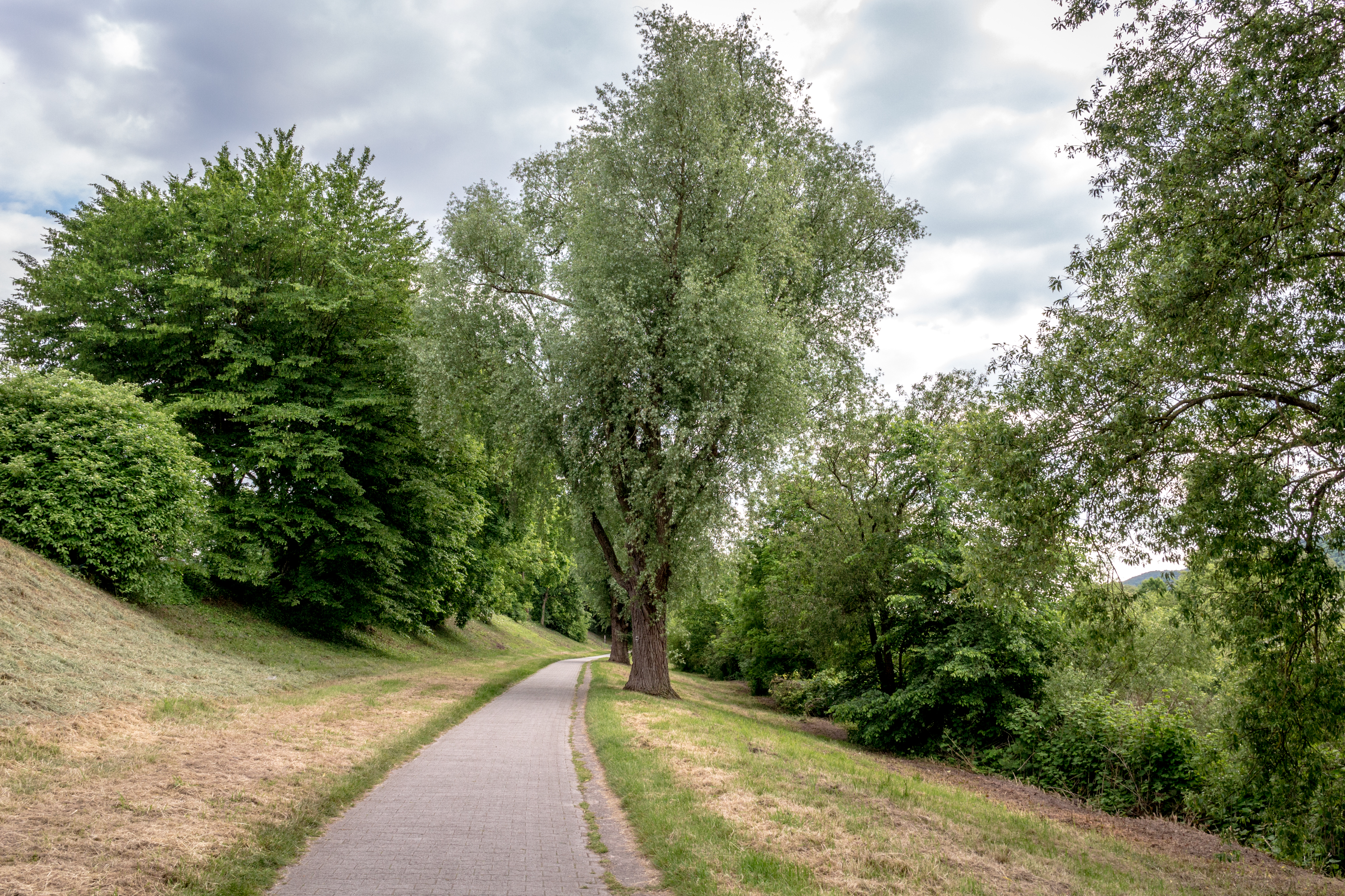 Blick in den geschützten Landschaftsbestandteil Baumbestand am Moselradweg Trier